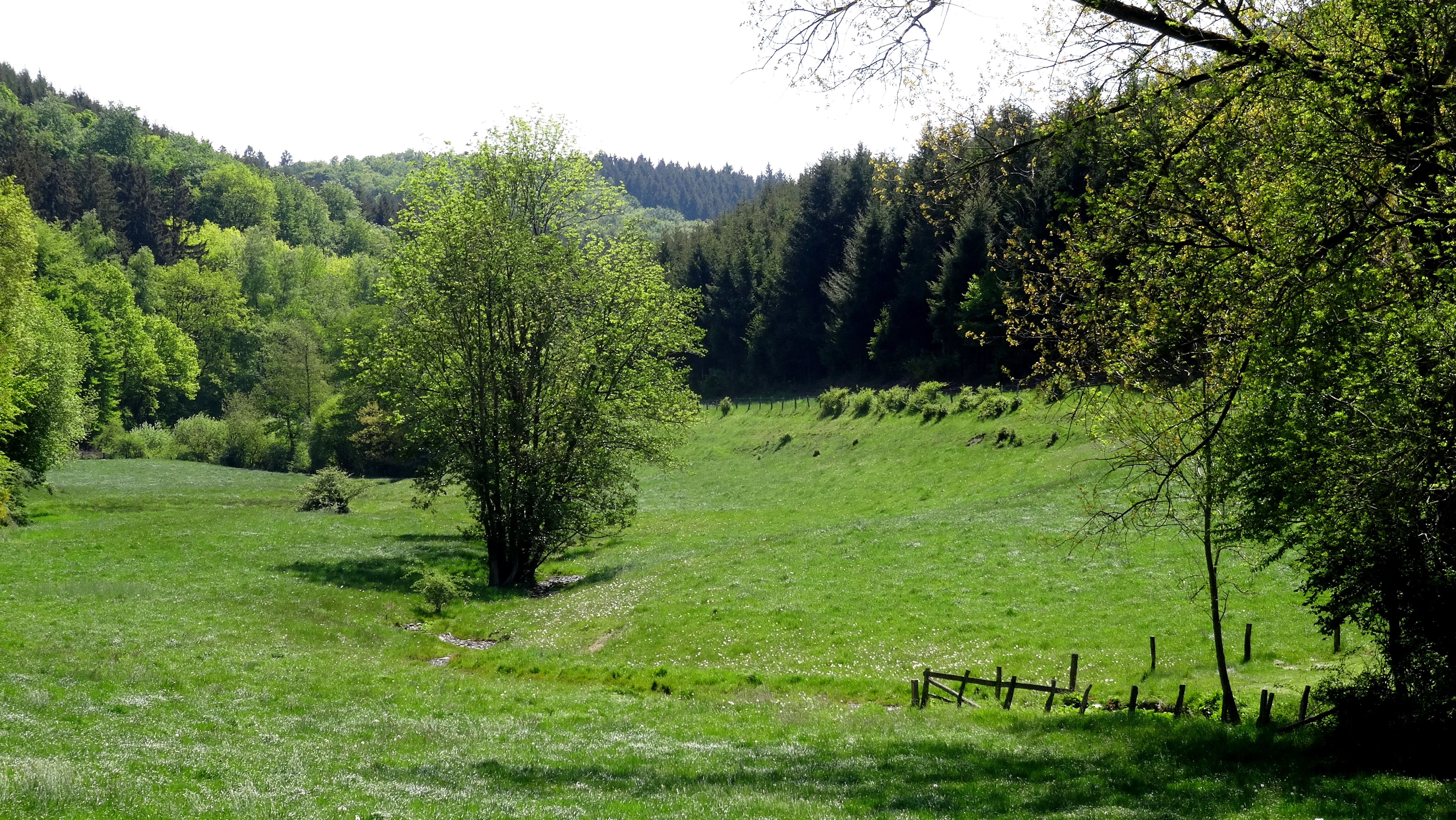 Kelbketal Richtung Süden